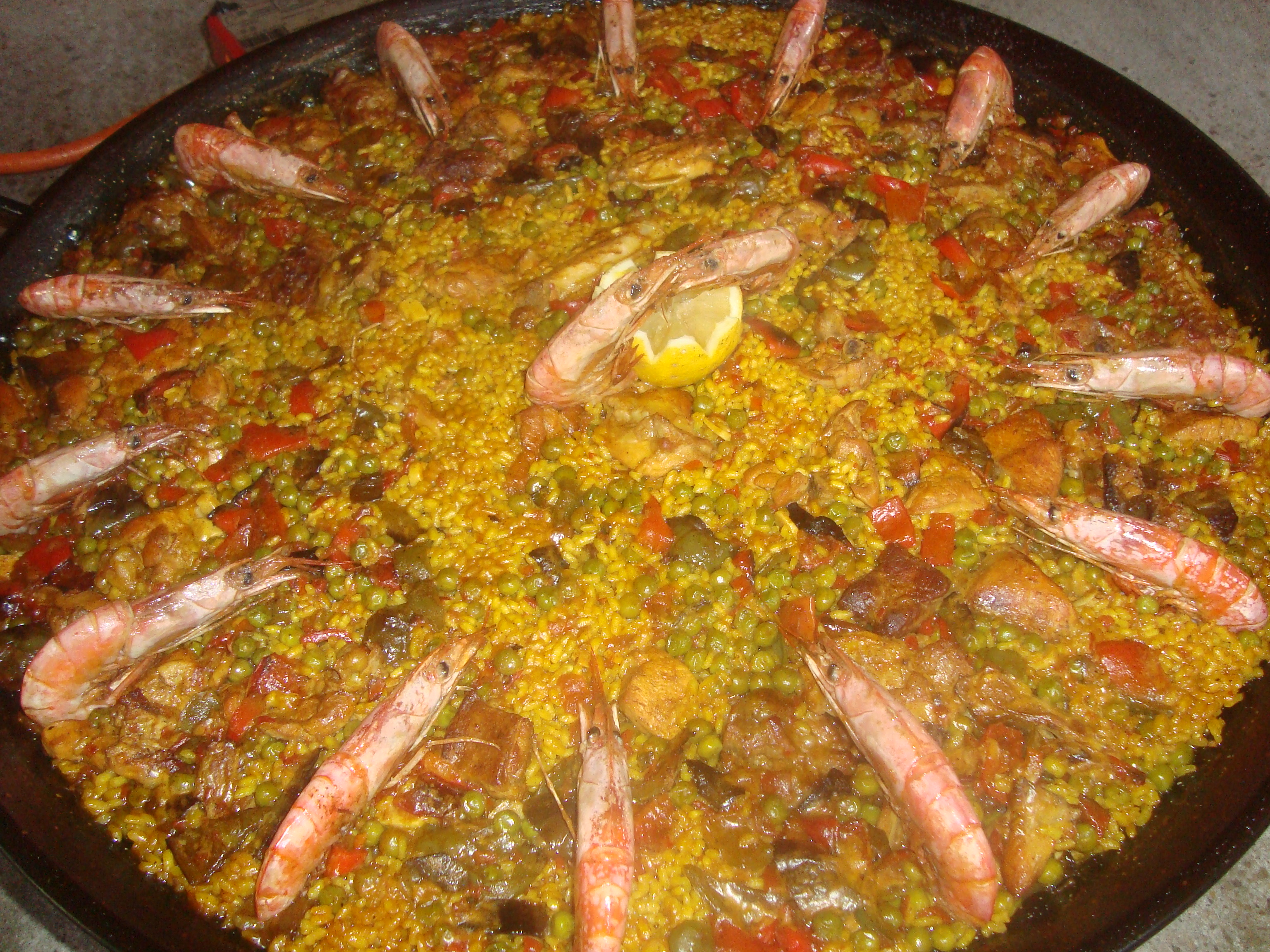 Paella valenciana (Castellón).